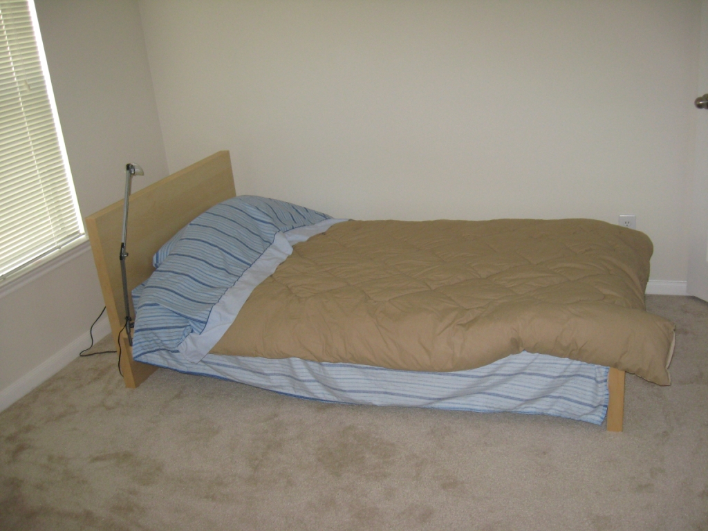 Кревет.